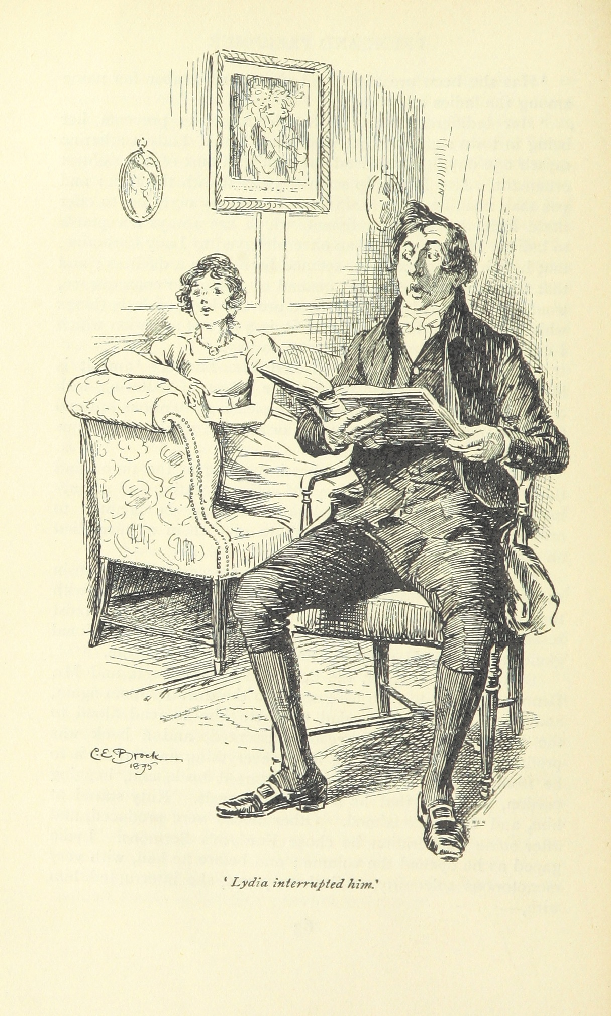 Illustration de C. E. Brock pour Pride and Prejudice (Edition MacMillan & C°, ch.14) Collins divertit ses cousines en leur lisant un sermon de Fordyce avec une monotone solennité.